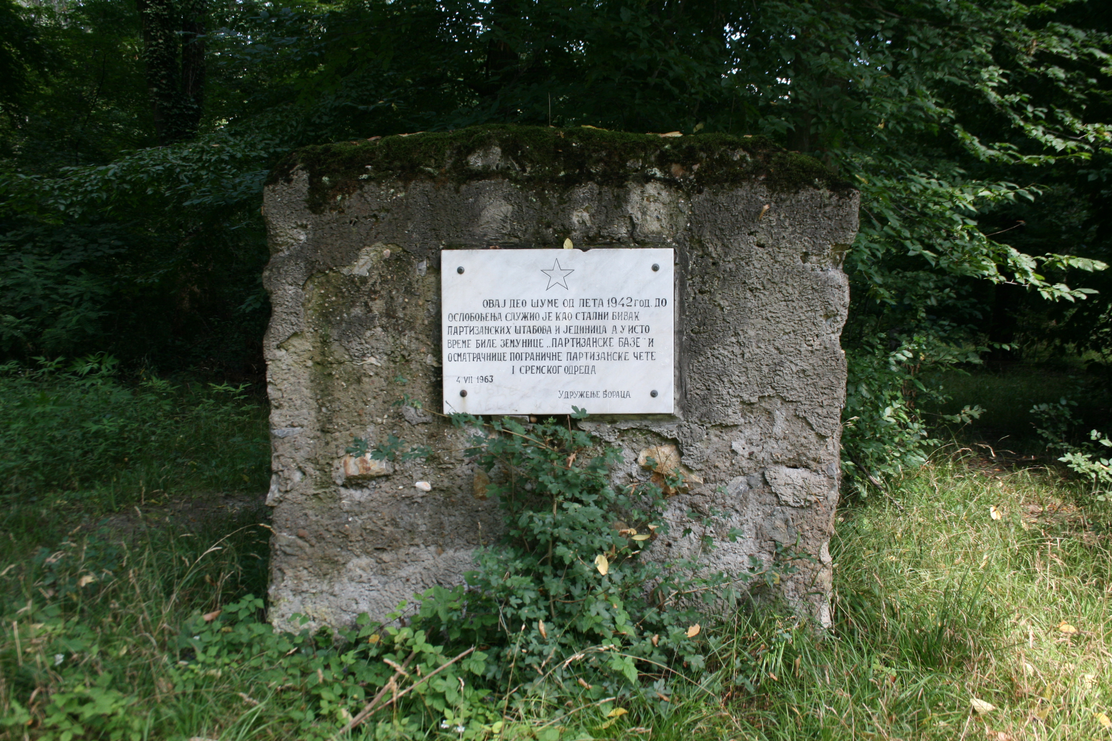 Спомен плоча у Бојчинској шуми, негде дубоко у шуми, где је влага огромна и лети има пуно комараца, стоји натпис: ”Овај део шуме од лета 1942. год. до ослобођења служио је као бивак партизанских штабова и једниница, а у исто време биле земунице ”партизанске базе” и осматрачнице пограничне партизанске чете Првог сремског одреда” 4. јула 1963. Удружење бораца